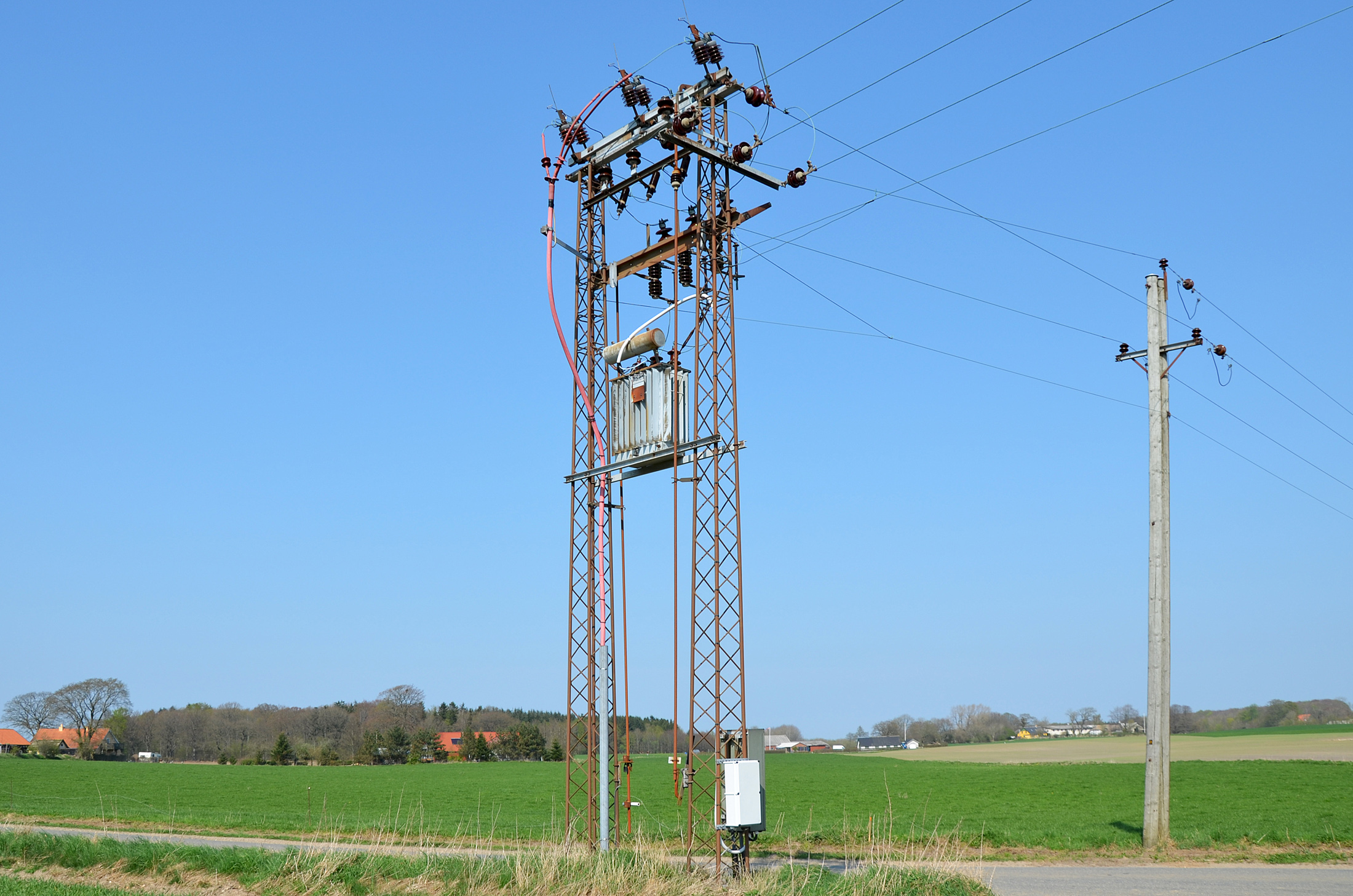 Mastetransformator